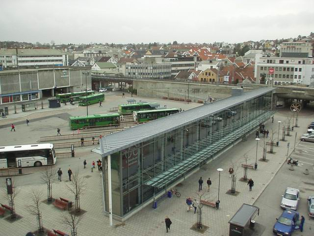 Hilde Topland